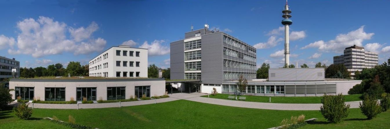 Panorama der Hochschule Ludwigshafen am Rhein